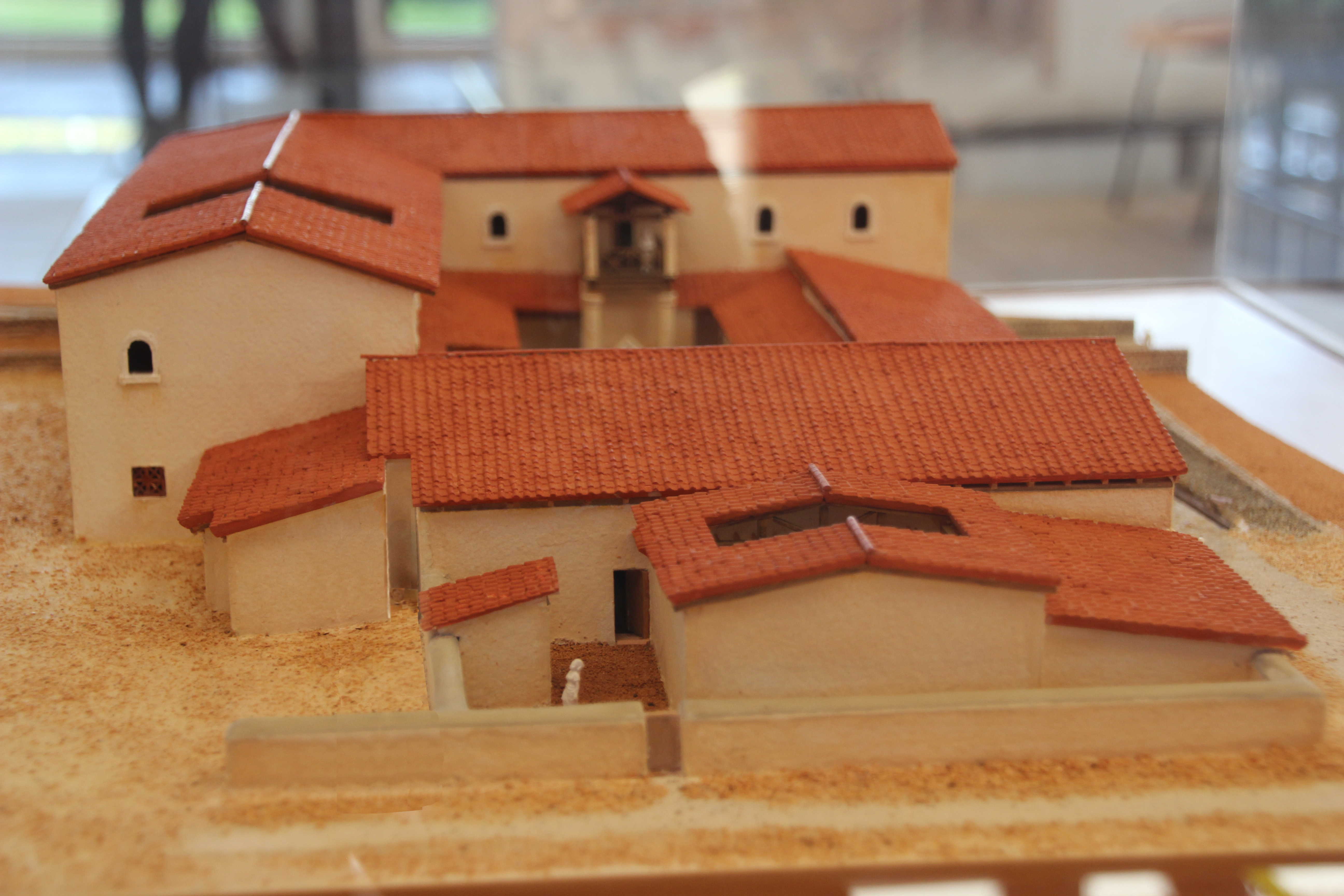 Maison au Grand Péristyle - Vieux-la-Romaine maquette vue du sud